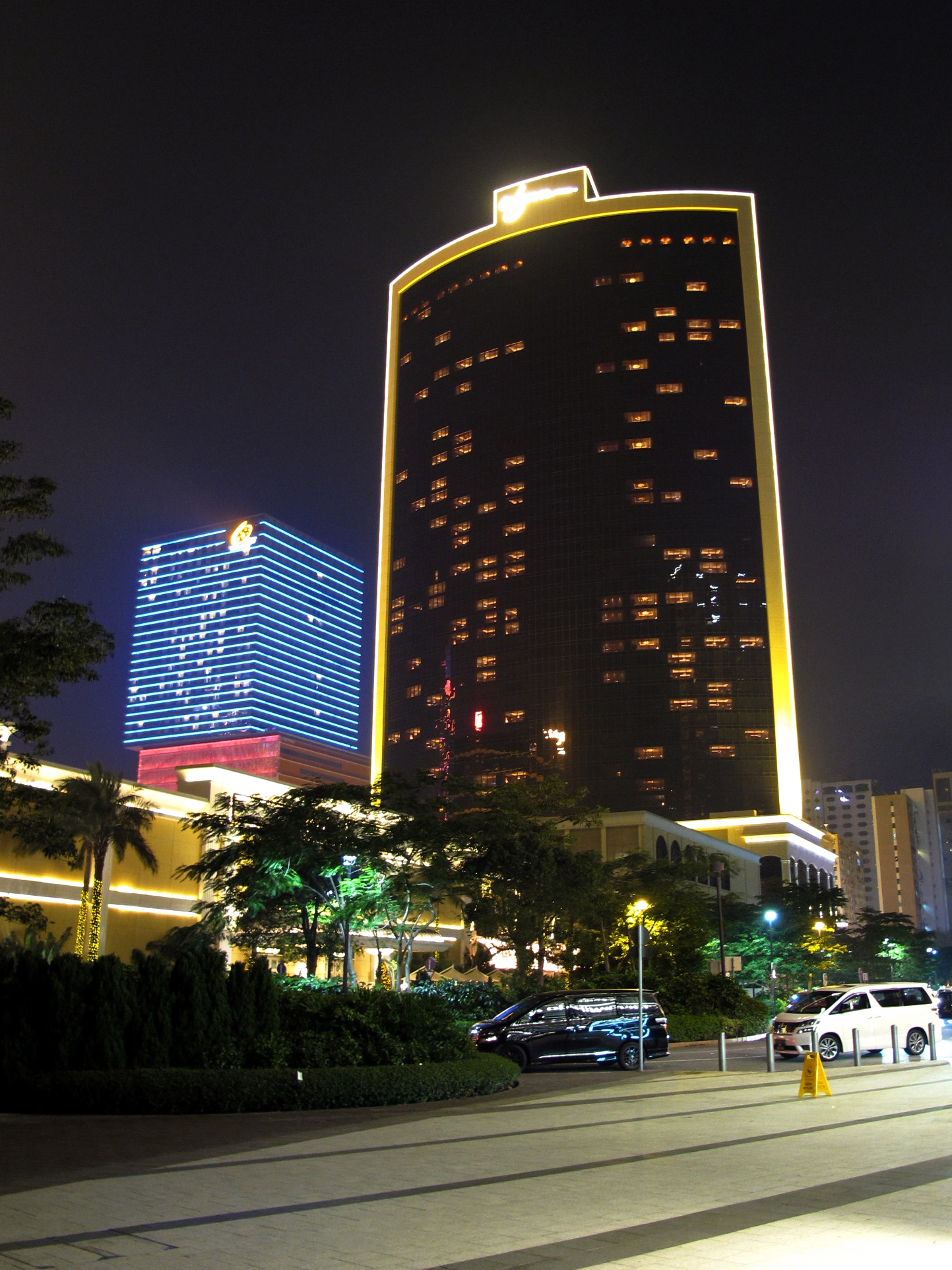 Wynn Encore Macau 澳門萬利酒店